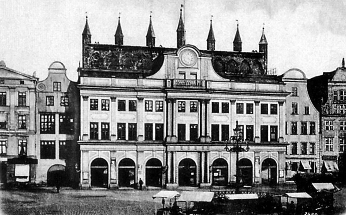 Rostock Markt mit Rathaus